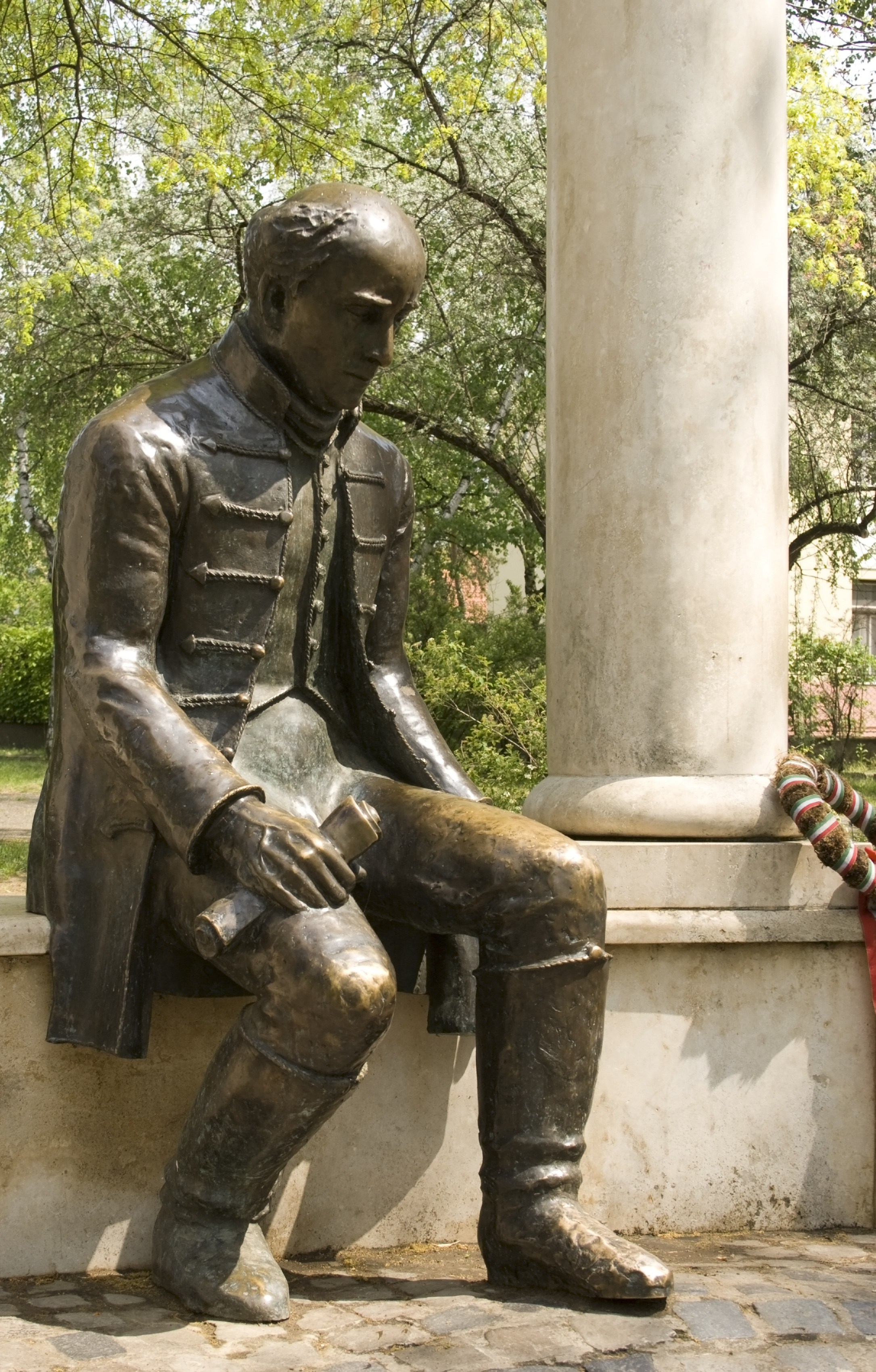 Statue of Ferenc Kölcsey in Mátészalka, Hungary. Sculptor: Lajos Bíró